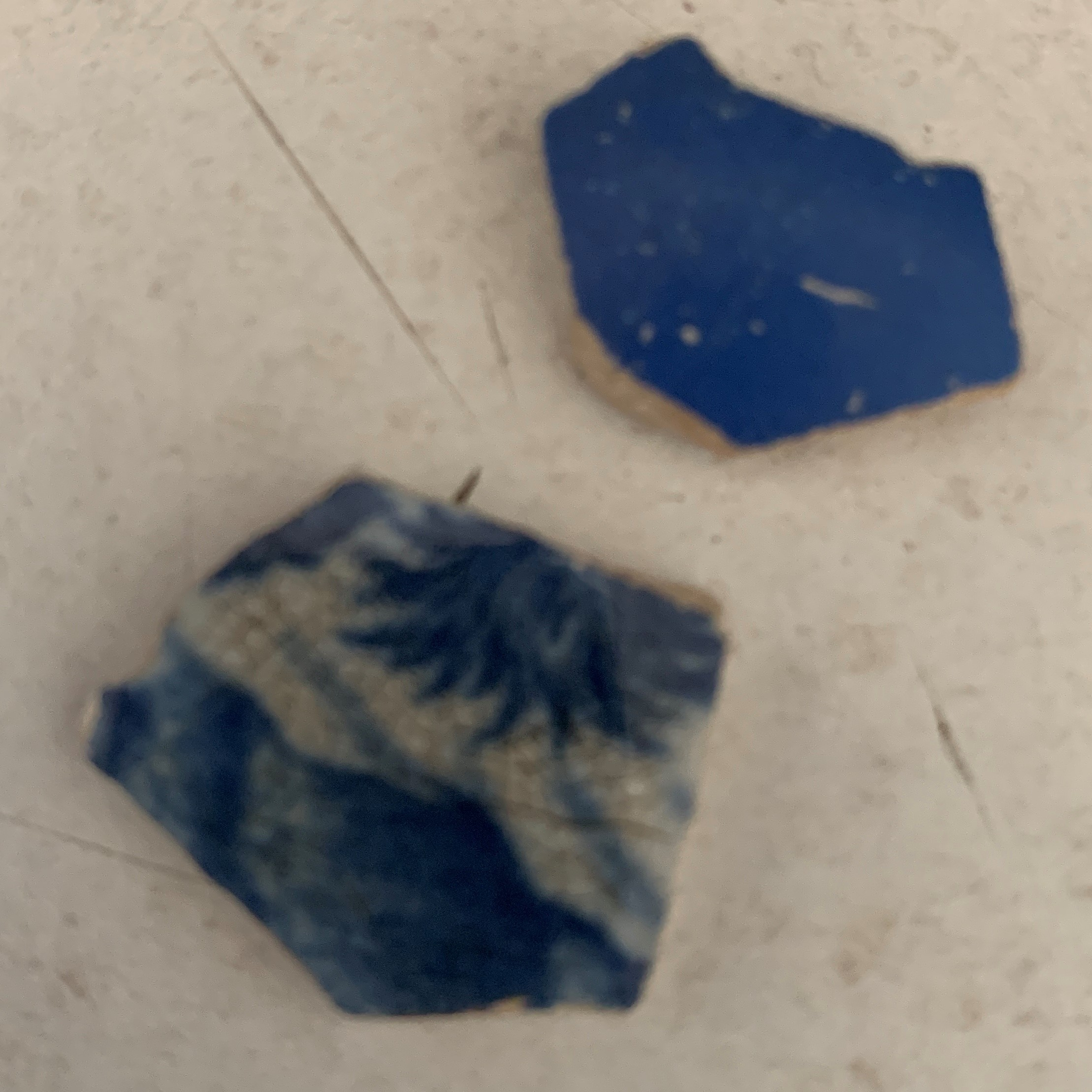 Enghraifft o ddarnau o lestri'r Stewart, llongddrylliad o 1901.